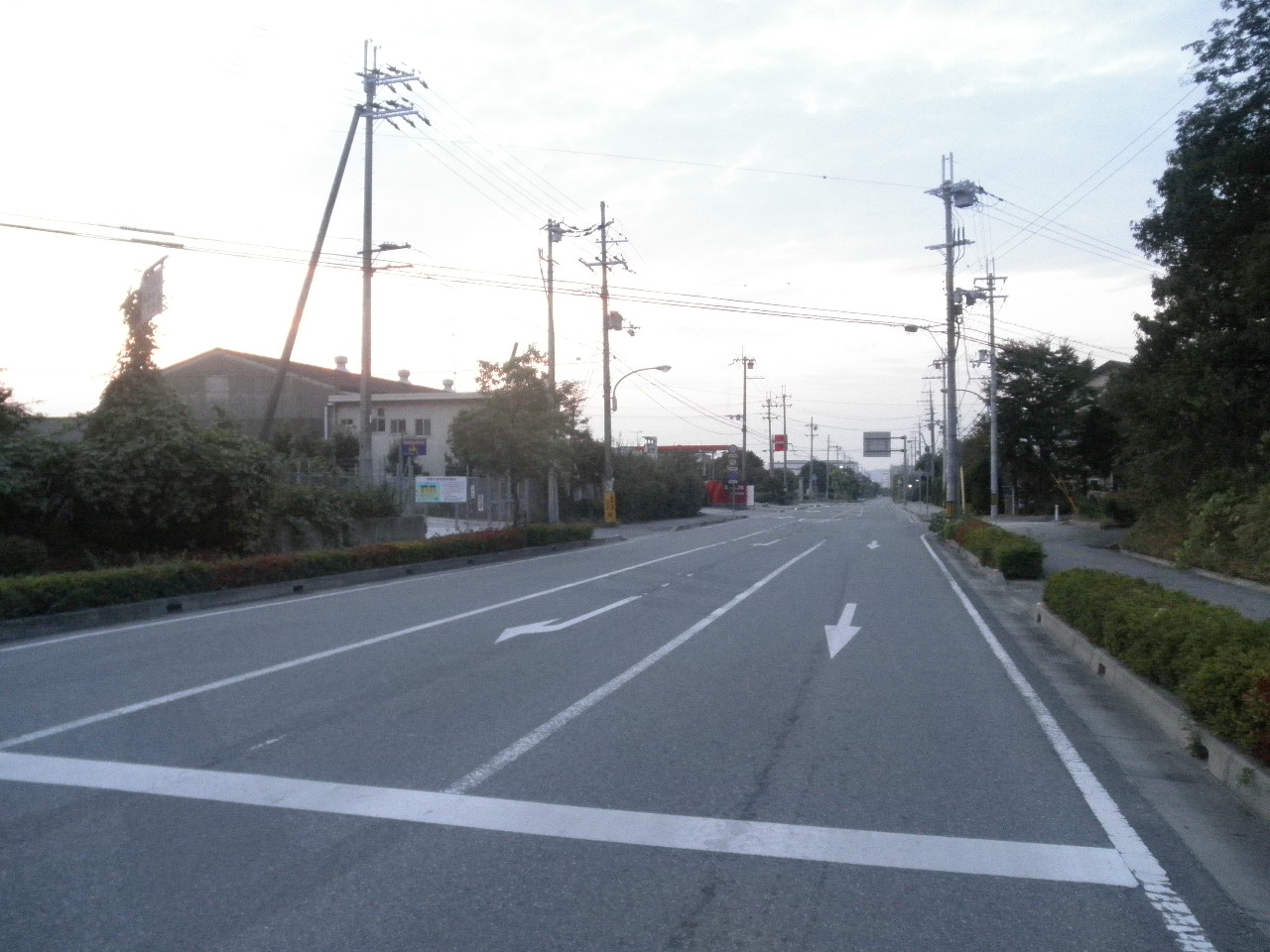 三木工場公園 南側出入口 2010年